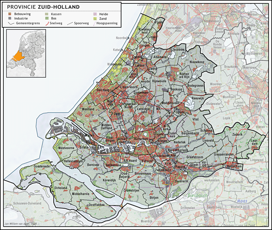 Provincie Zuid-Holland (2008) met indeling van gemeenten en impressie van het landschap.